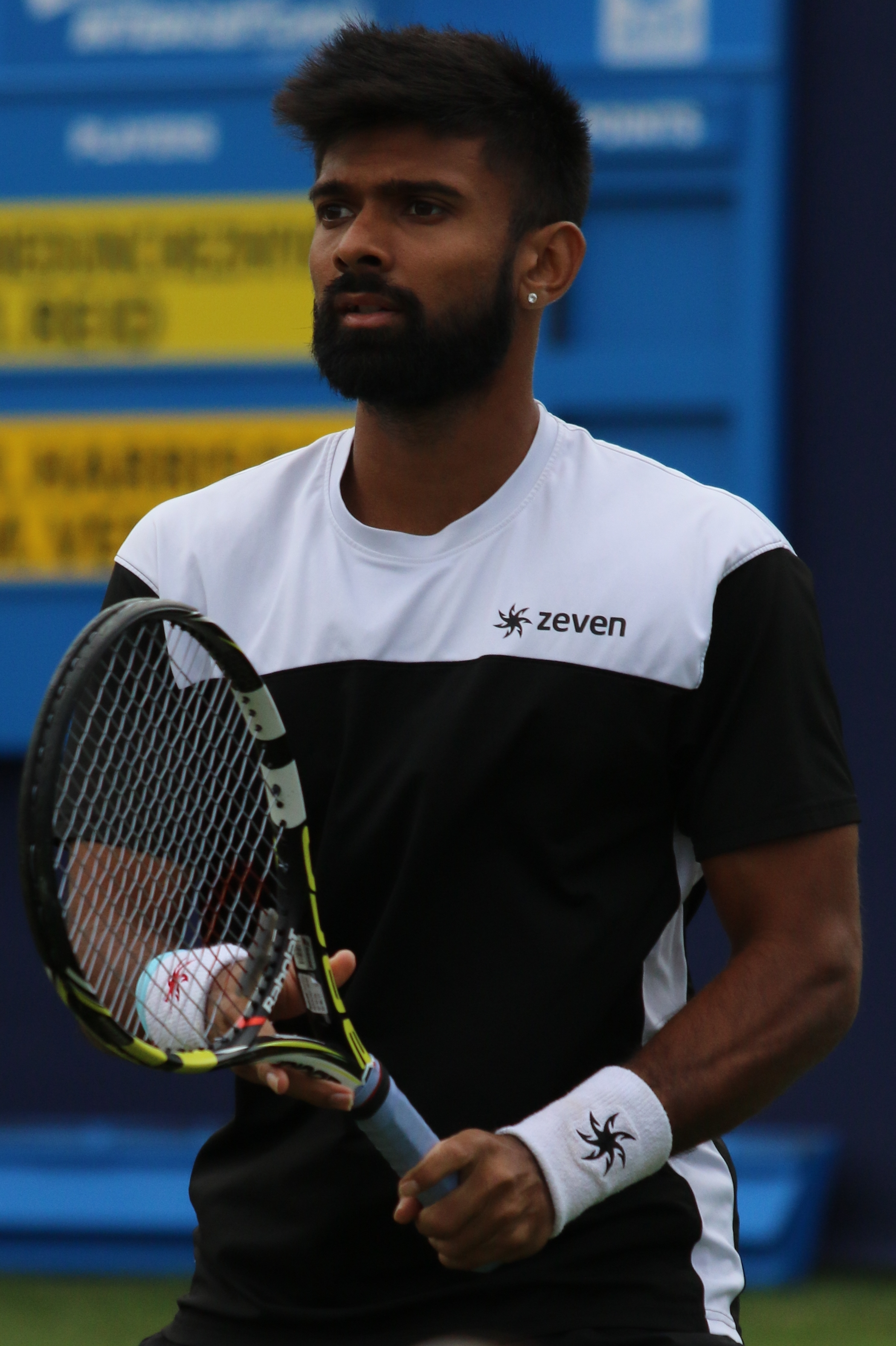 Nedunchezhiyan EBN17 (3)